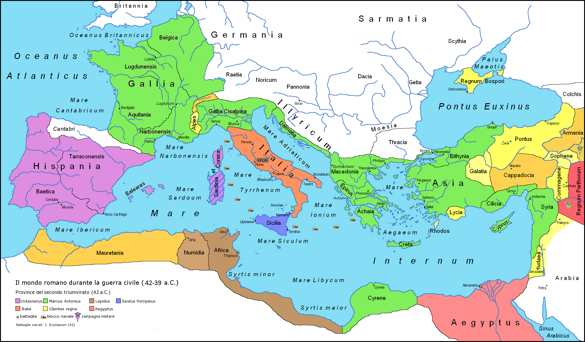 Adaptée de File:Roman-Empire-39BC-sm.png. Version provisoire.